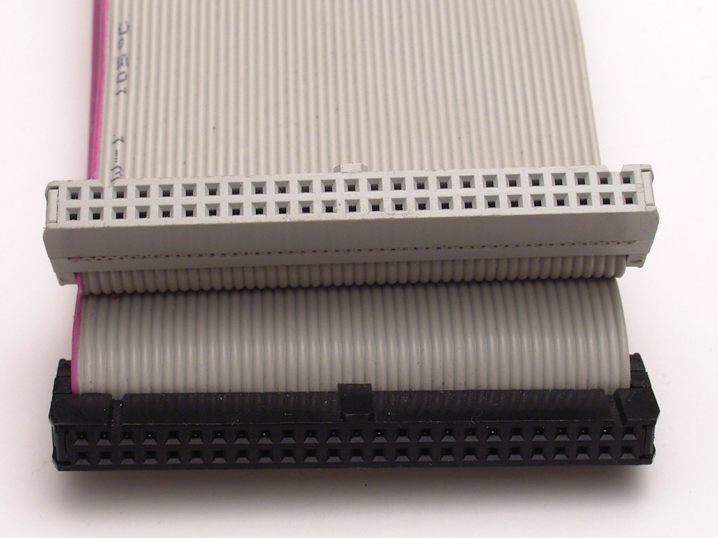 SCSI-Kabel intern mit 50-poligen Buchsenleisten, für 8 Bit Busbreite